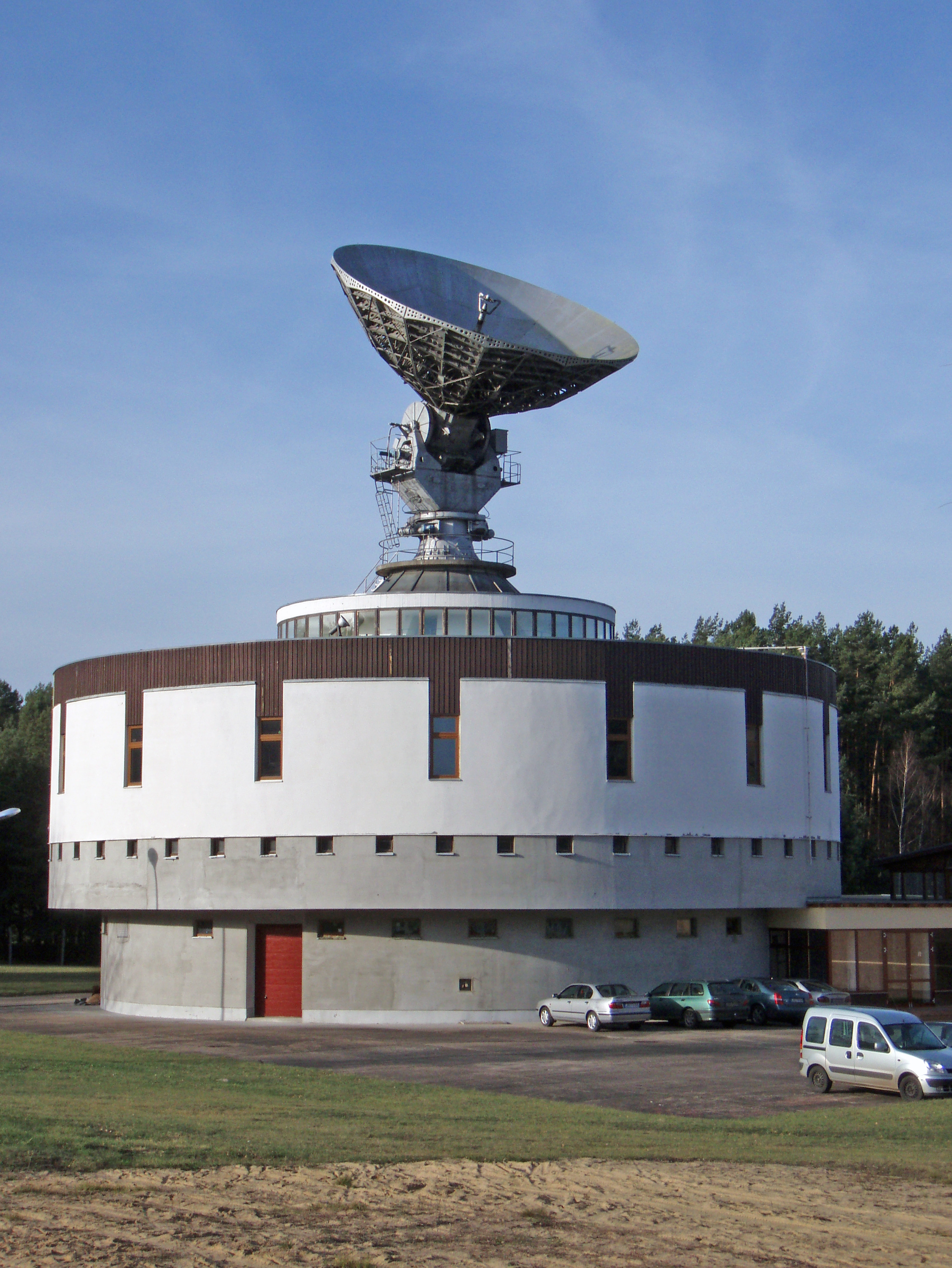 Ehemalige "Erdfunkstelle Intersputnik" bei Neu Golm (Brandenburg).